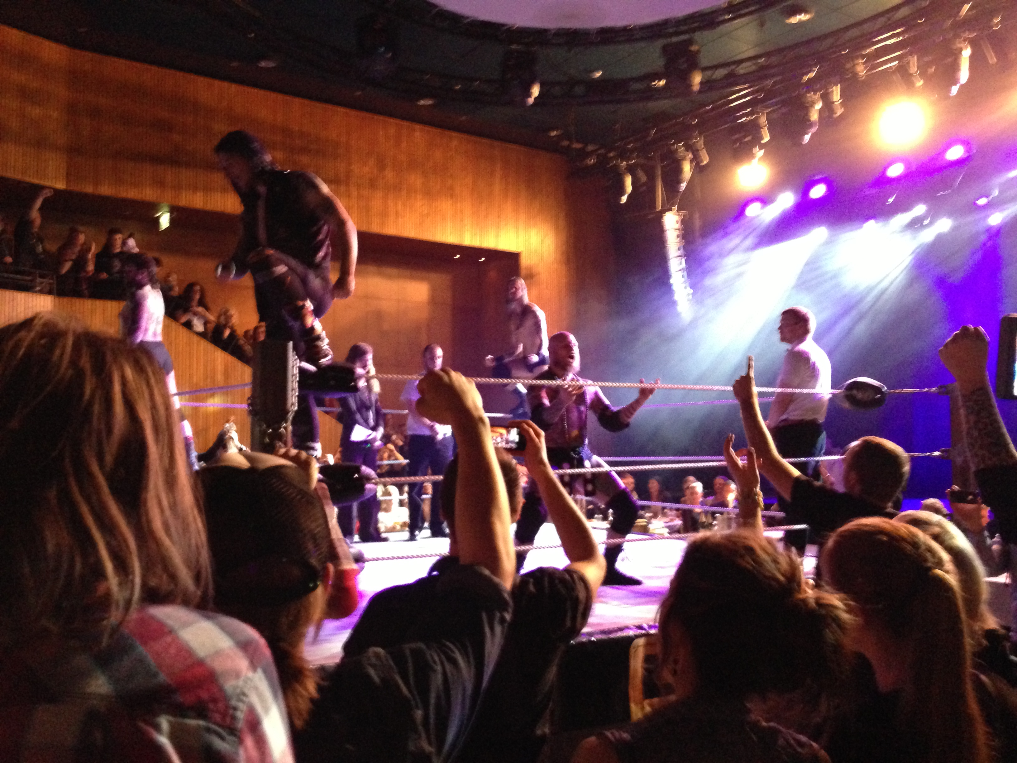 Picture depicted Conny Mejsel, Ante Cimex, Scandinavian Shiva and Bad Buddha during the GBG wrestling venue Ultimate Vengeance